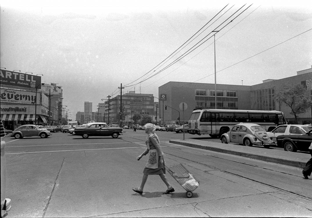 Fotografía antigua de la Ciudad de México resguardadas por el Museo Archivo de la Fotografía (MAF) de la Ciudad de México.